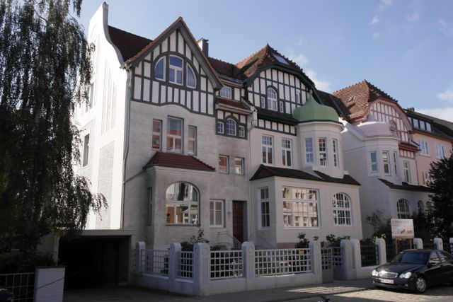 Wohnhaus in Bremen, Lüder-von-Bentheim-Straße 10Das abgebildete Objekt ist ein geschütztes Kulturdenkmal in der Freien Hansestadt Bremen, mit der Nr. 0847 beim Landesamt für Denkmalpflege registriert.